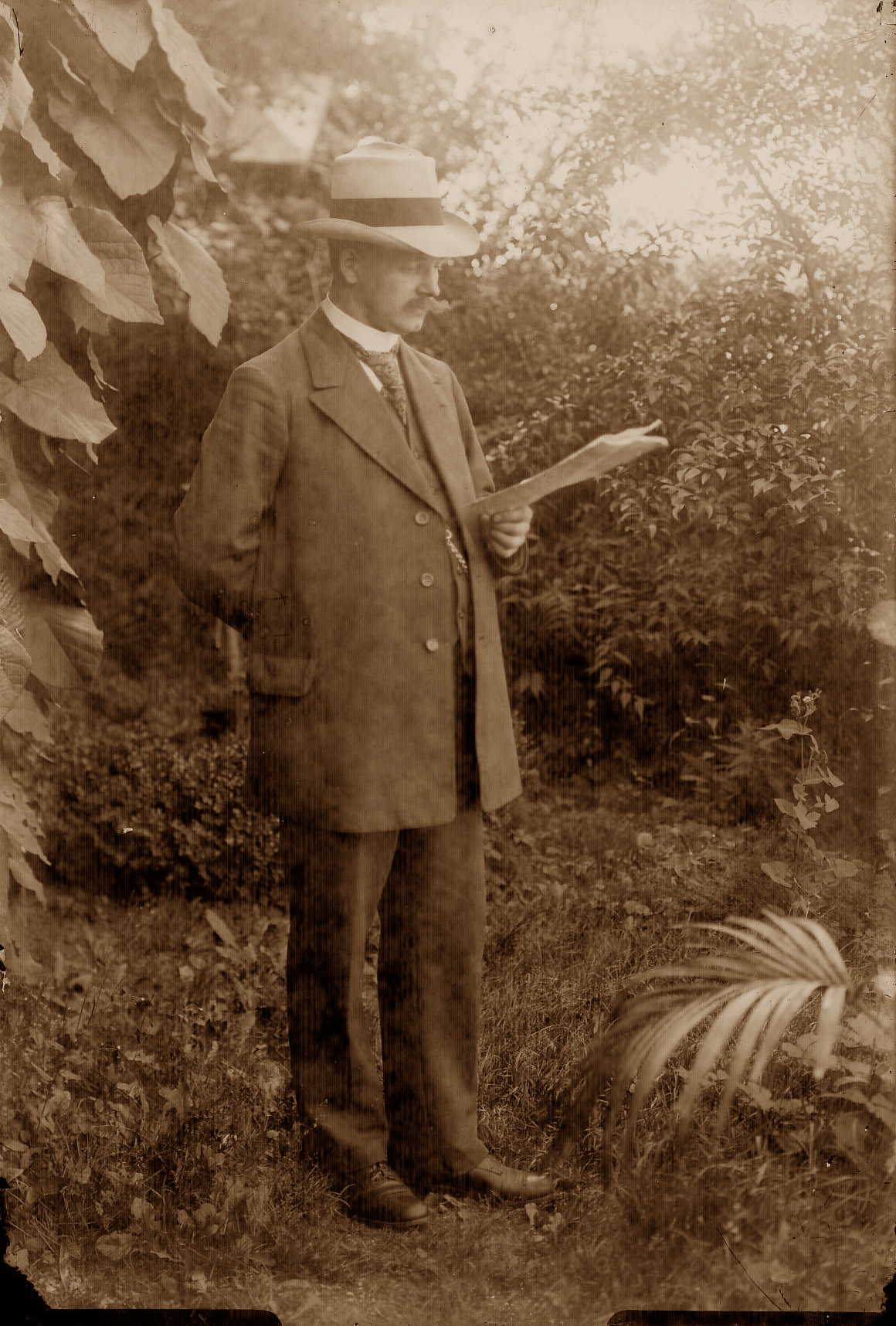 Friedrich Schulte im Garten seines Hauses um 1900